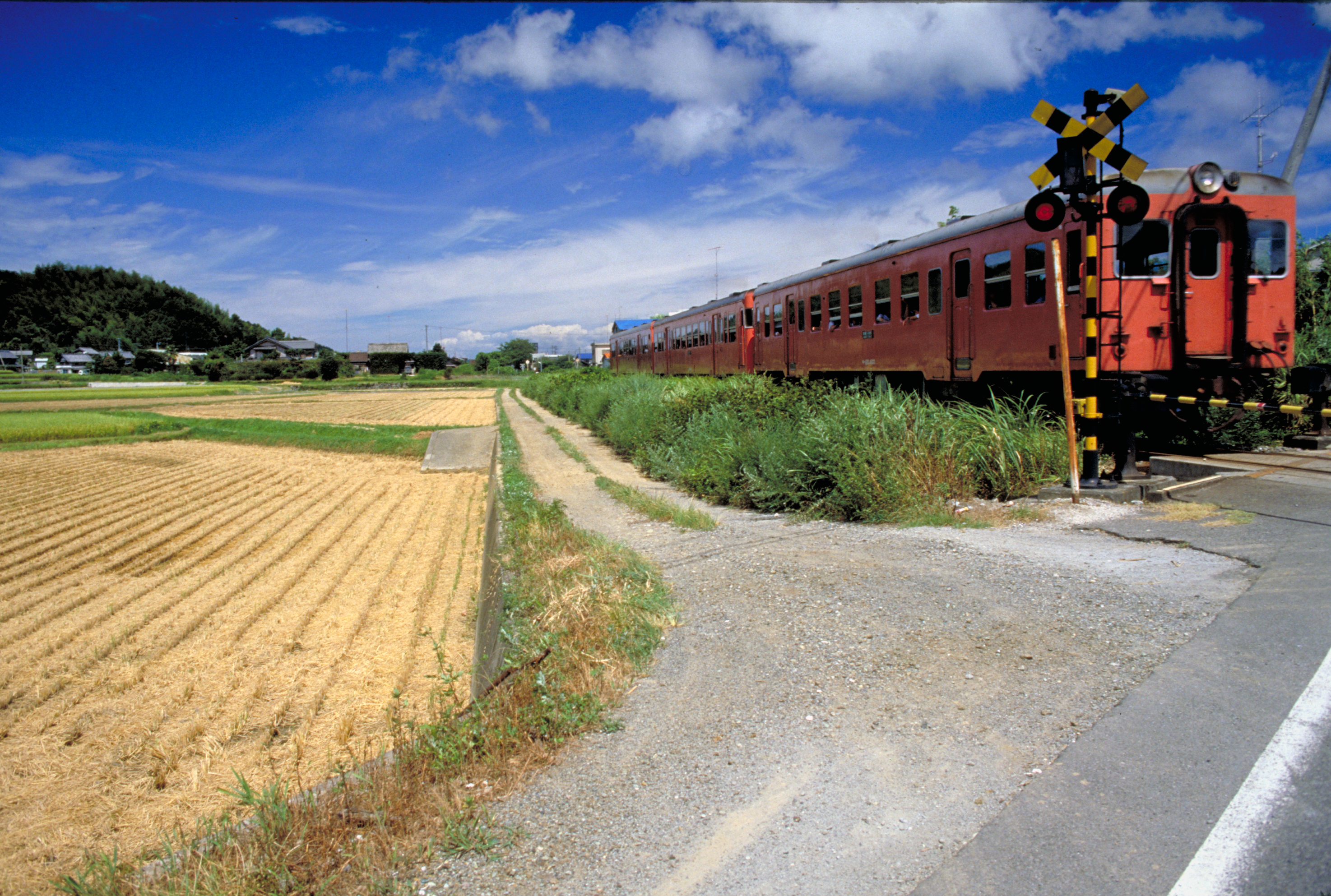 1985年国鉄当時の牟岐線